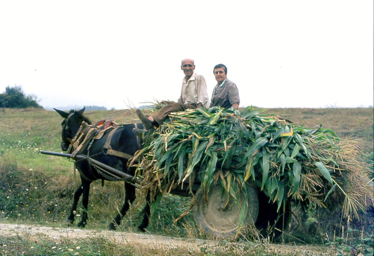 Crop of maize on a mule cart, Galicia (E) 1979